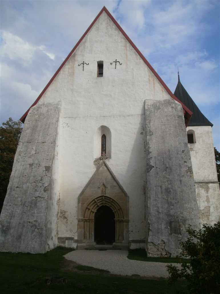 Vaade läänest, varasem peasissekäik. September 2013.